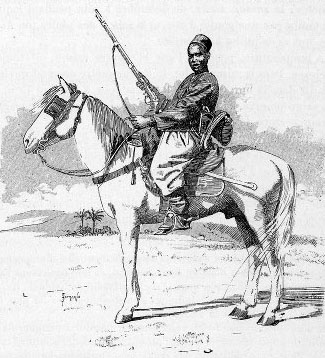 Spahi sénégalais (illustration de Côte occidentale d'Afrique du Colonel Frey, fig. 11, p. 201)